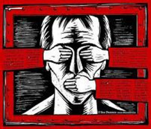 Кодекс ћутања